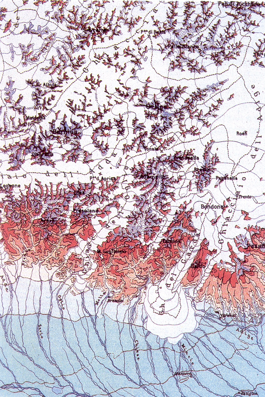 Ricostruzione del grande ghiacciaio alpino durante la glaciazione di Würm